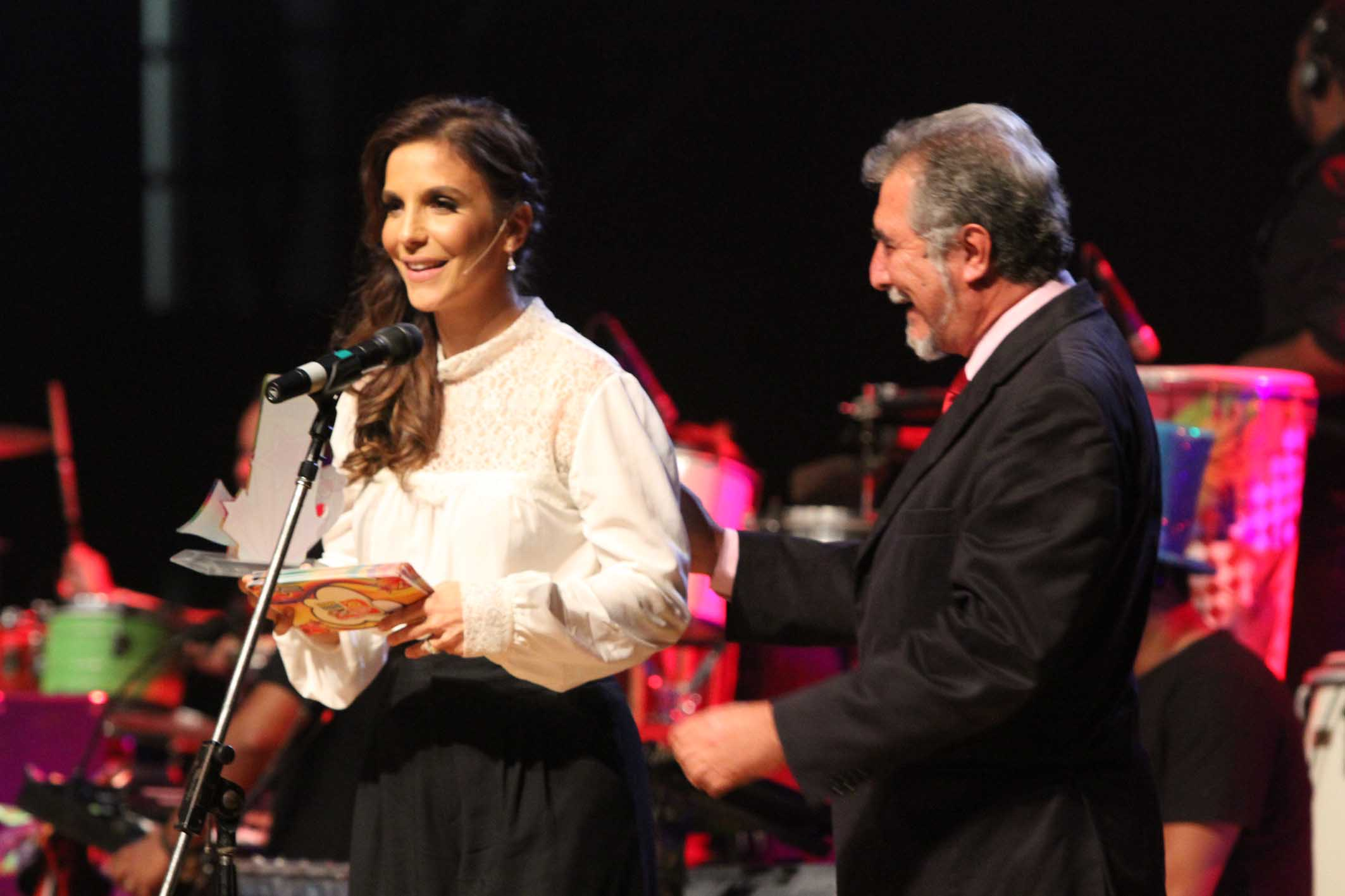 Ivete Sangalo recebendo o "Troféu Dodô & Osmar" do secretário de turismo Domingos Leonelli. A cerimonia aconteceu no Teatro Castro Alves, no dia 06 de Abril de 2011.